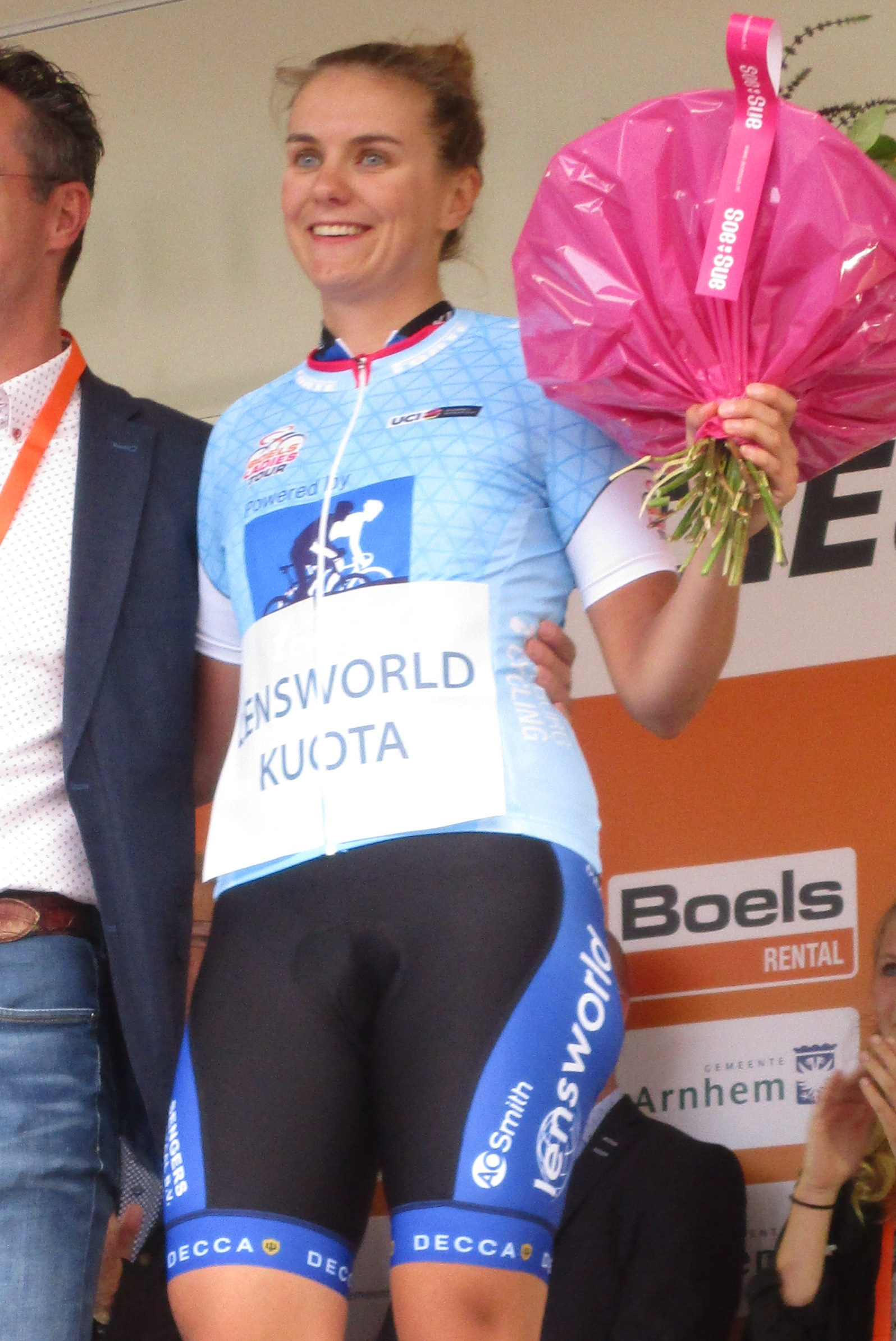 Huldiging van de winnaars van de 5e etappe van de Boels Ladies Tour 2017 in Vaals.